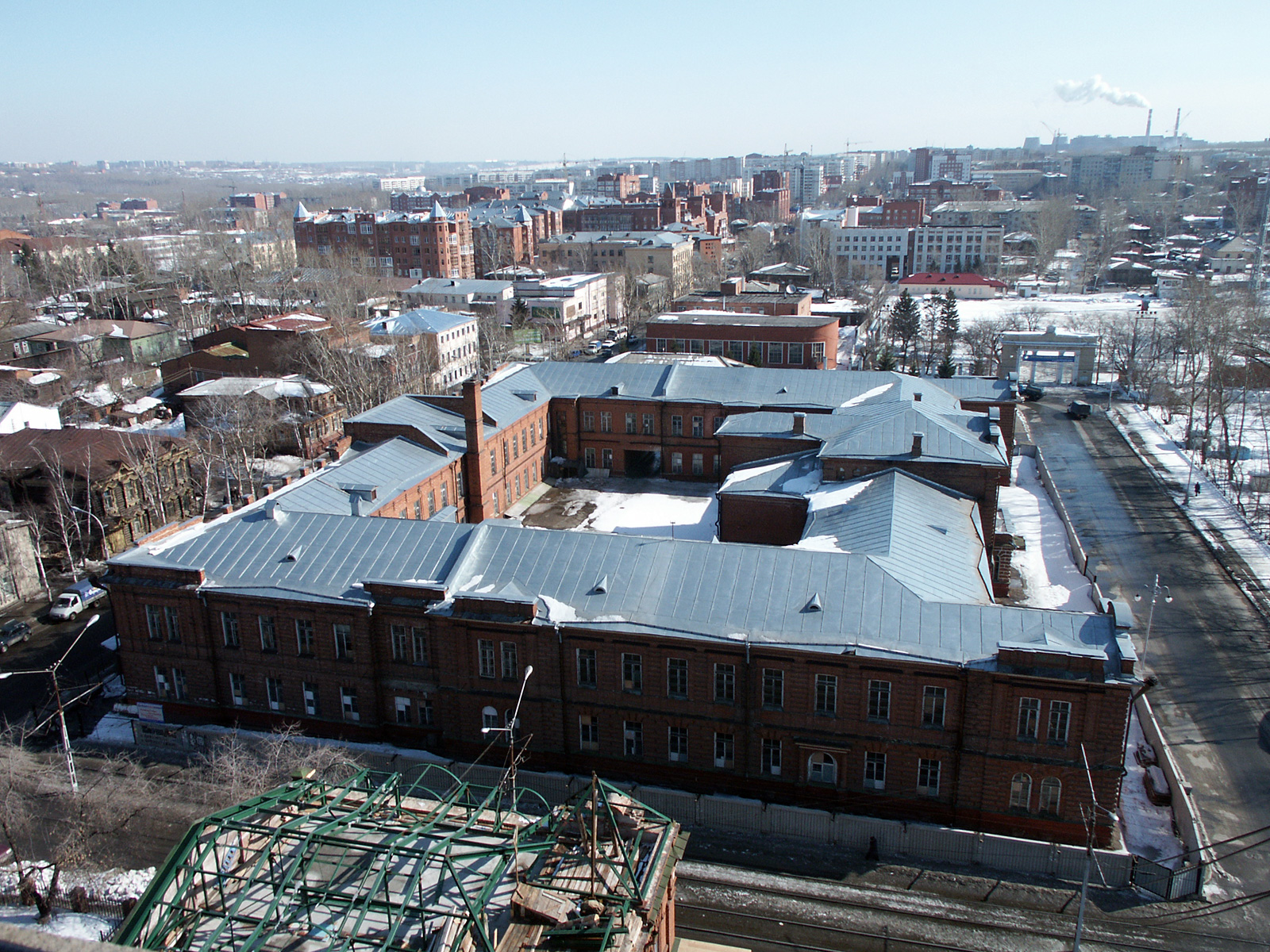 Томская мужская гимназия (вид в восточном направлении с крыши Облстатуправления)